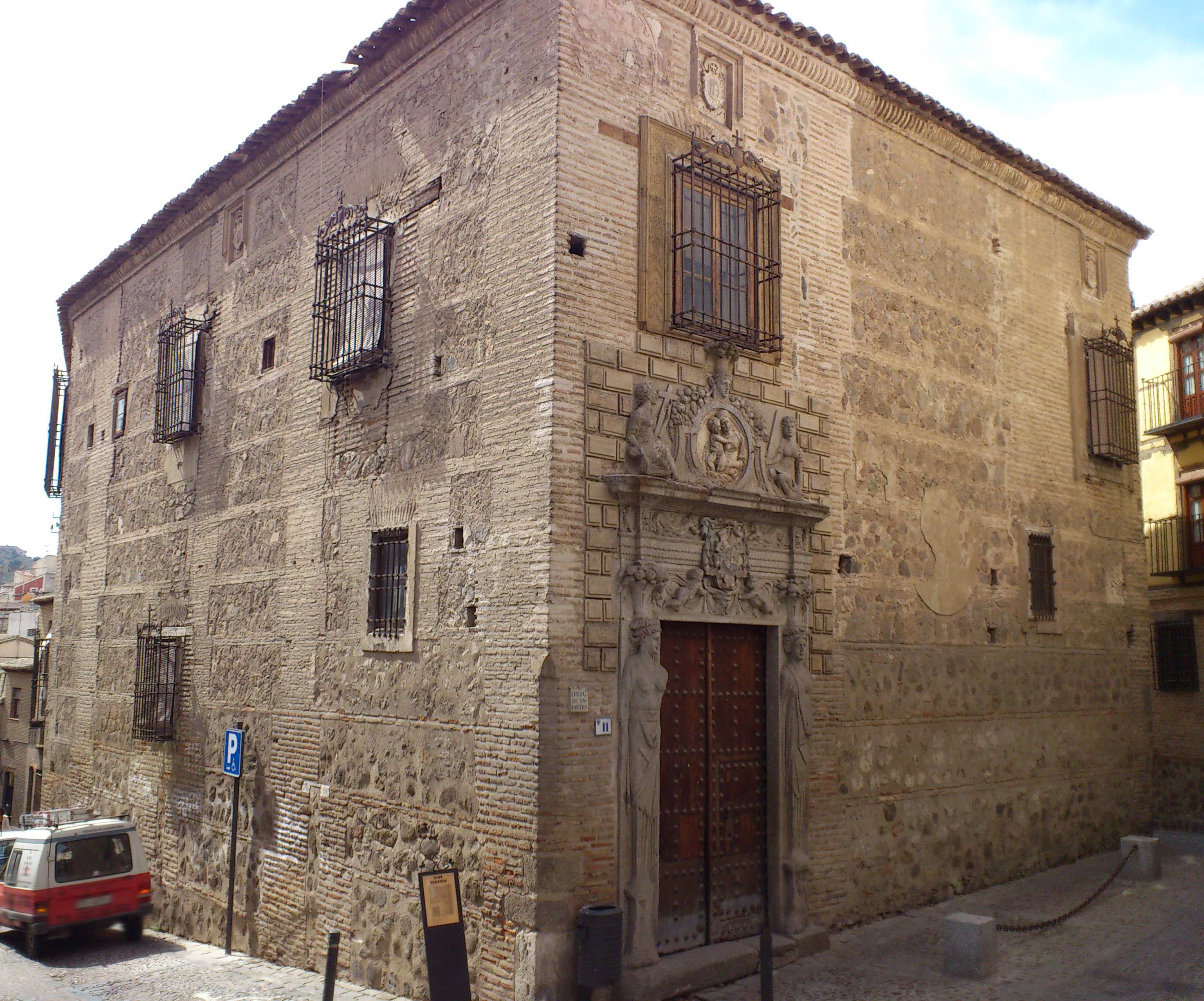 Puerta Principal